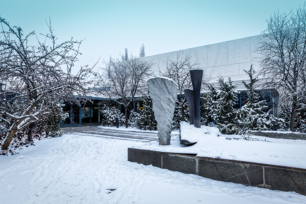 Iisalmen kulttuurikeskuksen pääsisäänkäynti